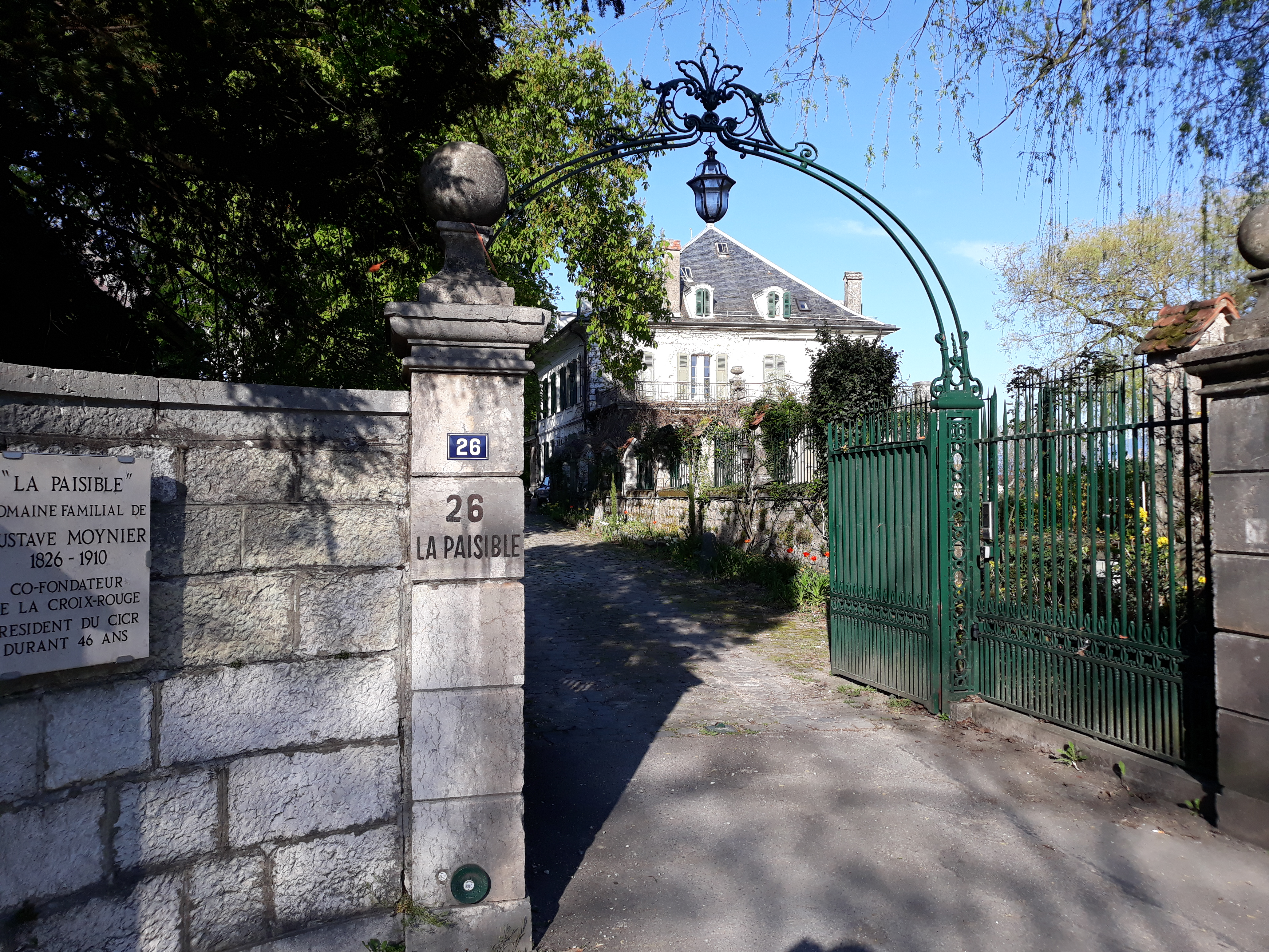 Villa "La Paisible" rue de Gex à Ferney Voltaire.(F) ancienne résidence de la famille de Gustave Moynier. (1826-1910)